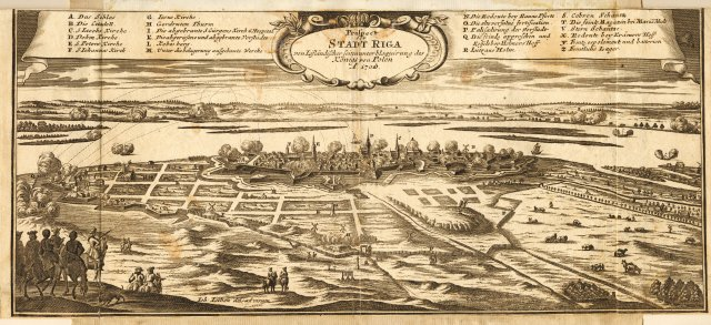 Scan from Johann Christoph Brotze's book Sammlung verschiedner Liefländischer Monumente. Prospect der Stadt Riga von Lifländischer Seiten unter bloquirung des Königs von Polen Anno 1700 [die Gravüre].